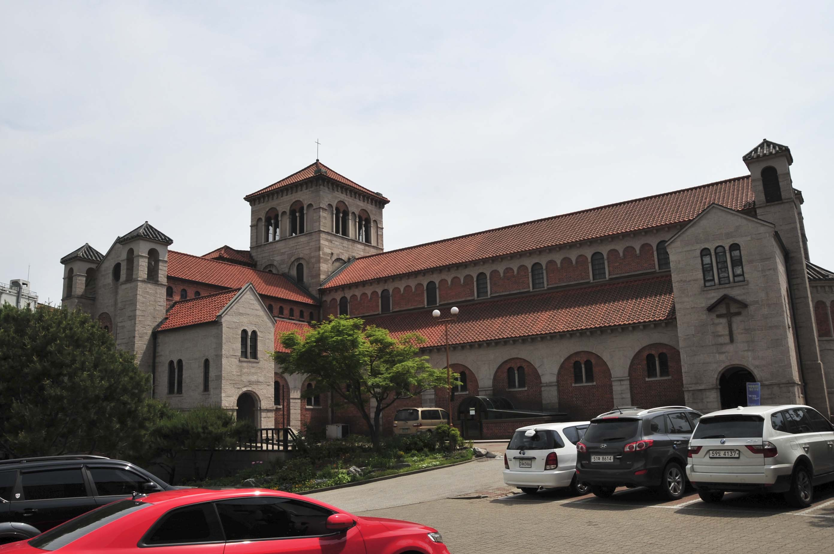 외부 모습, 대한성공회 서울주교좌대성당, 대한민국 서울특별시 중구 세종대로21길 15 (정동 3번지)에 있는 대한민국의 대표적인 성공회 대성당